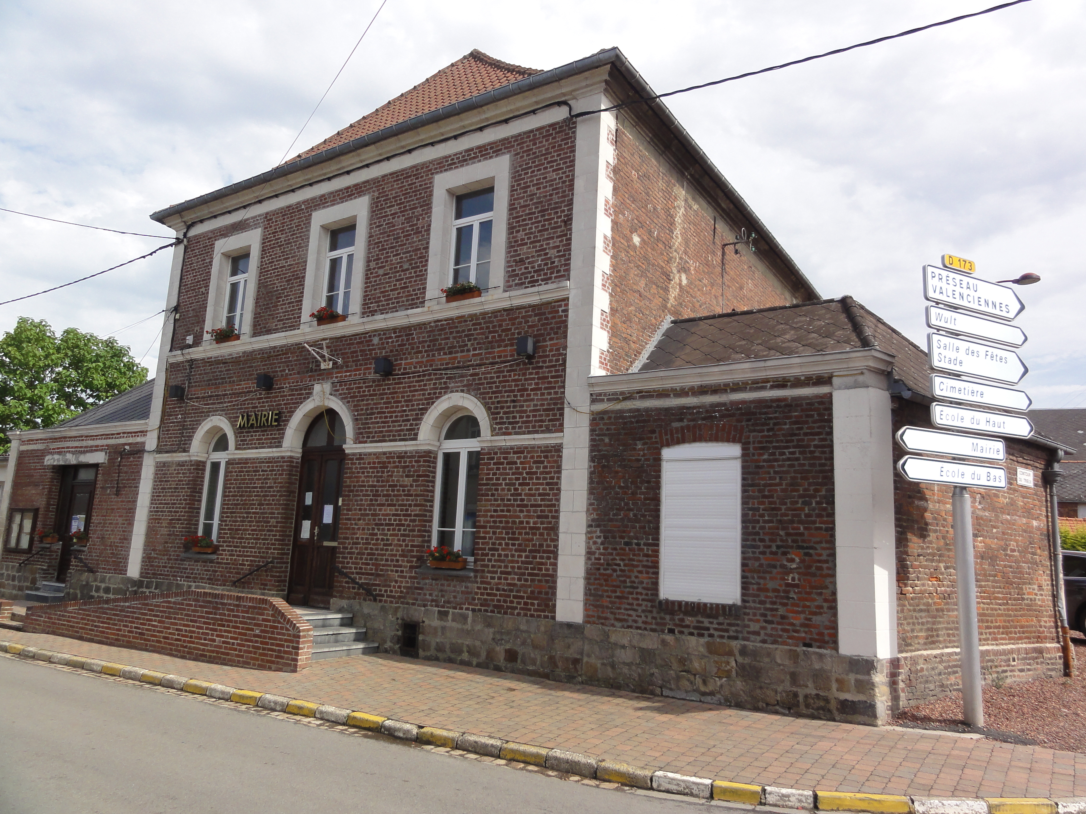 Maresches(Nord,Fr) mairie